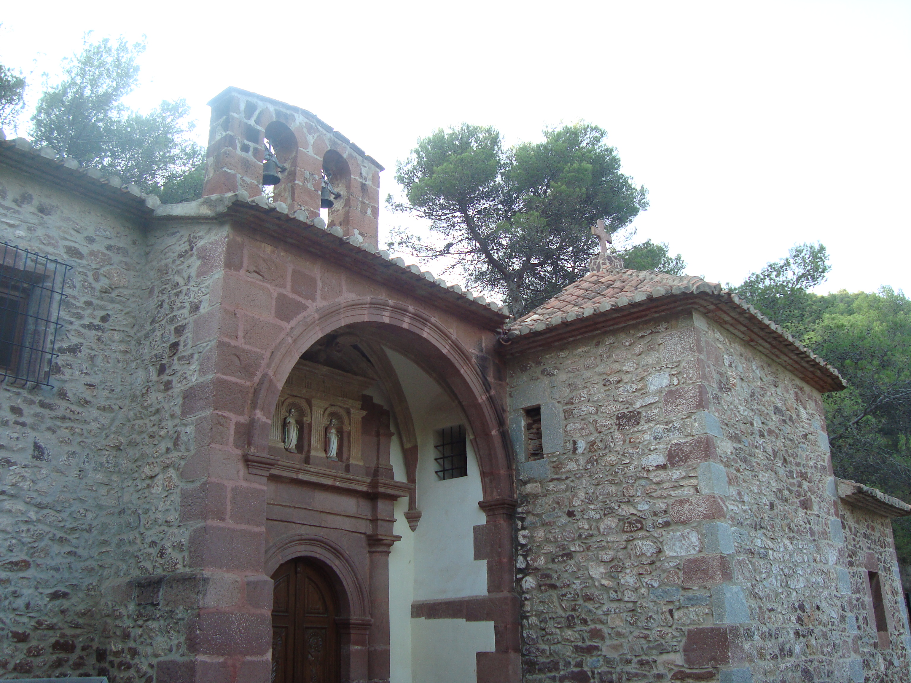 Ermita de las Santas Santa Águeda y Santa Lucía, Cabanes